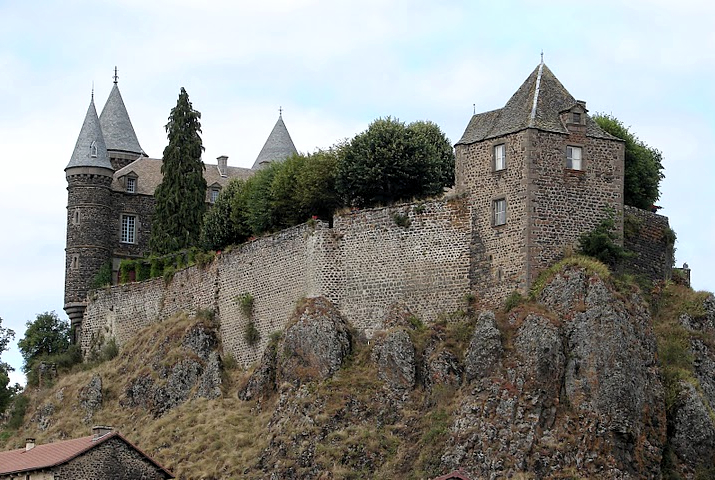 Château de Sailhant, dans le Cantal.